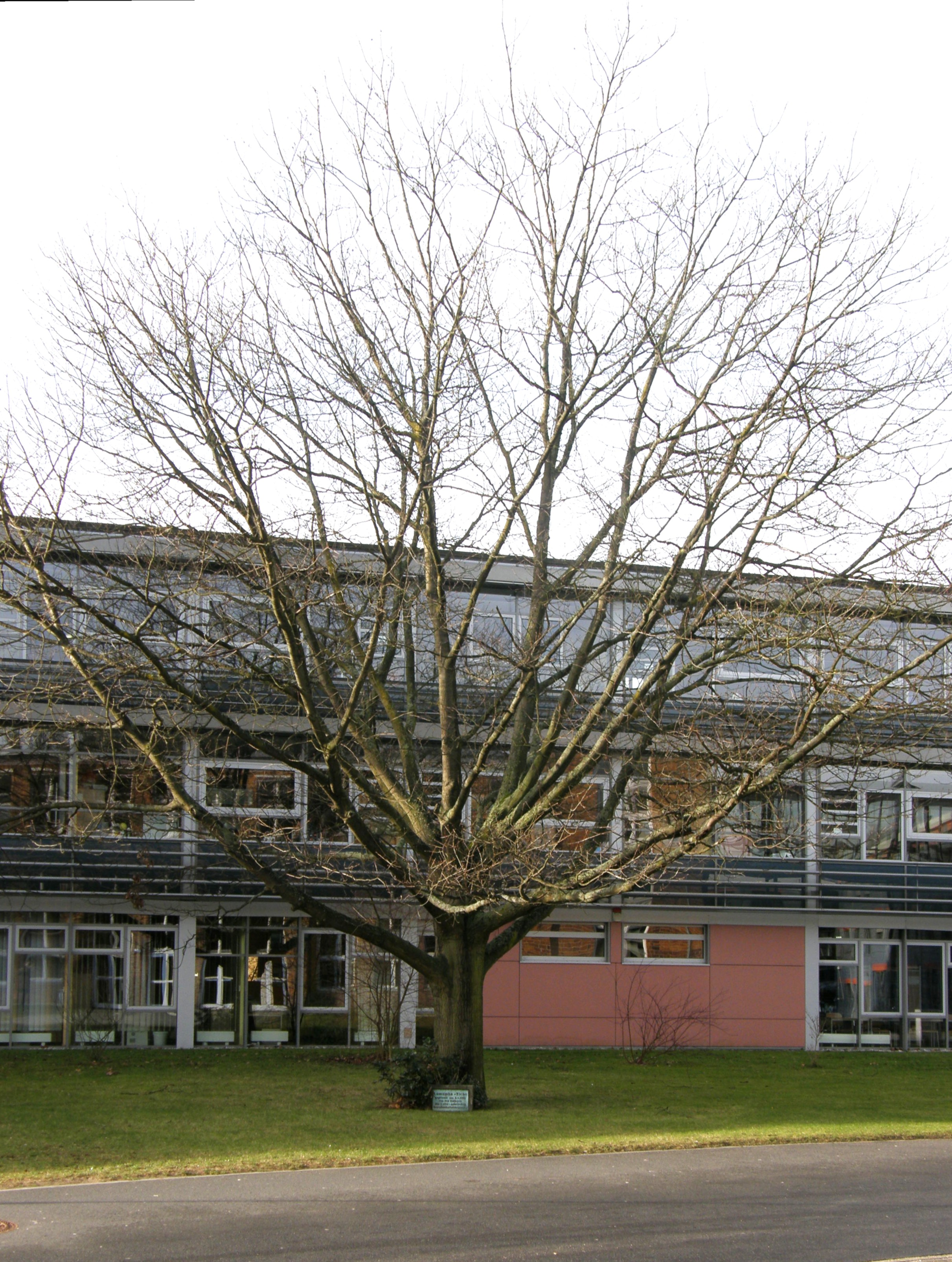 Bernau bei Berlin, Stadtteil Waldfrieden: "Lumumba-Eiche" vor Schulneubau 2003/04